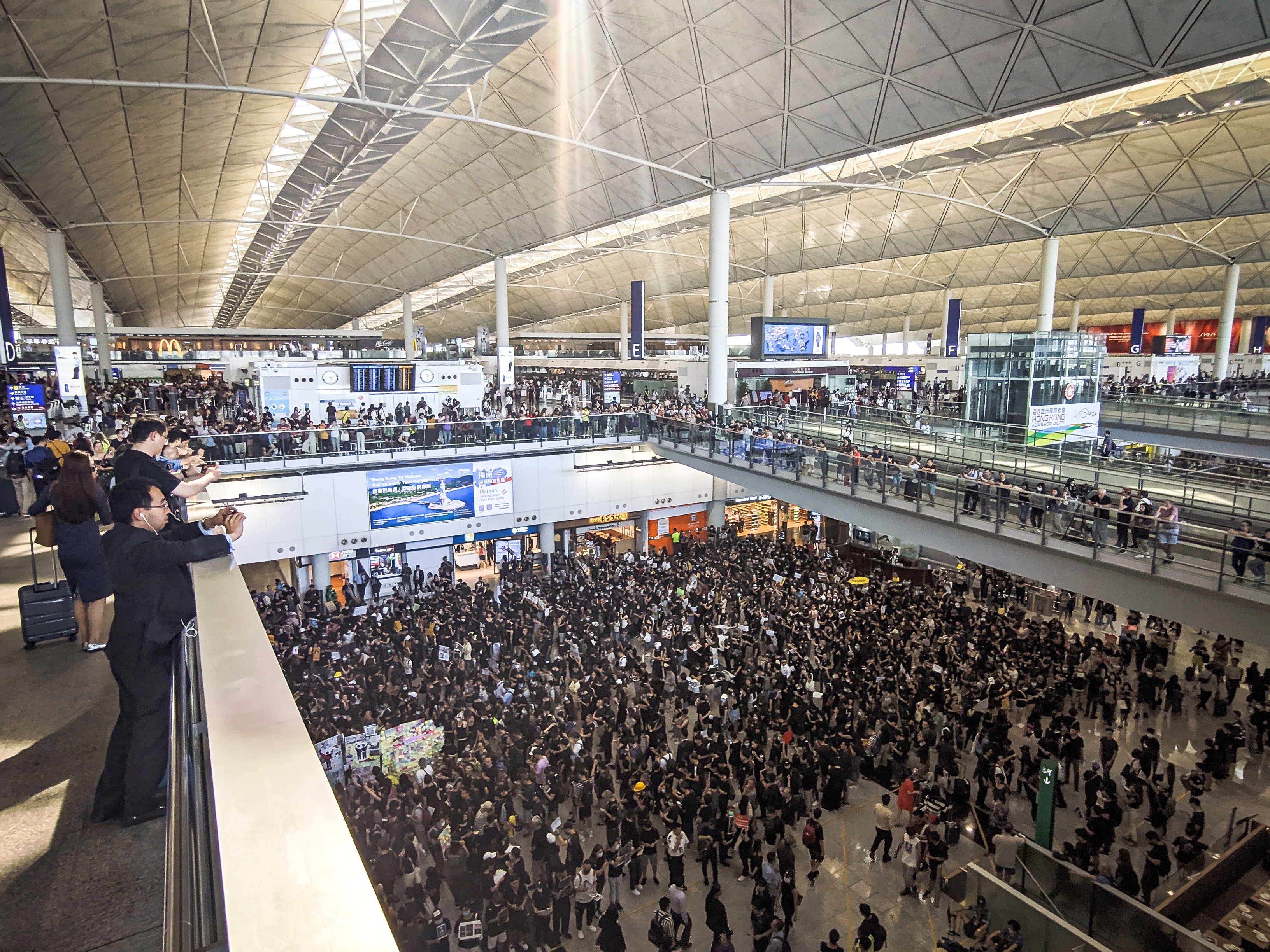 IMG_20190726_161256